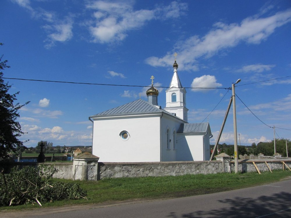 Гудзевічы. Свята-Раства-Багародзіцкая царква